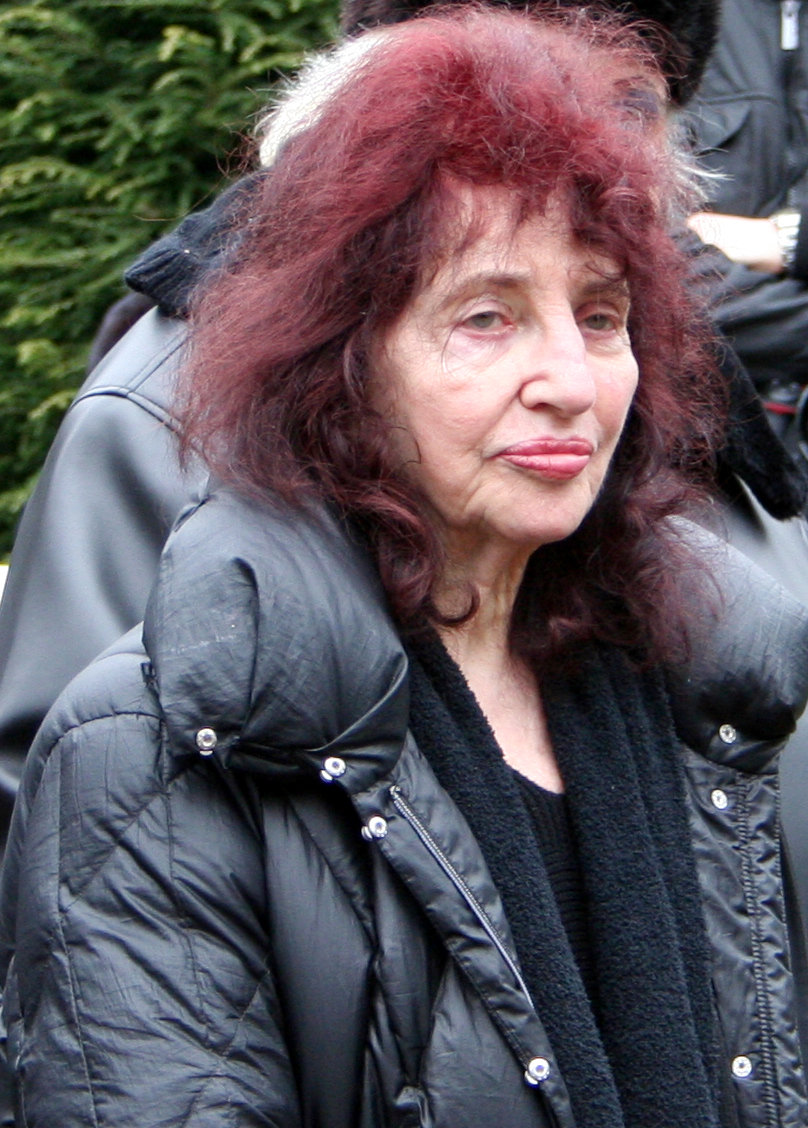 Ruth Peggy Sophie Parnass (* 11. Oktober 1934 in Hamburg) ist eine deutsch-schwedische Schauspielerin, Kolumnistin, Gerichtsreporterin und Autorin. Sie lebt in Hamburg.